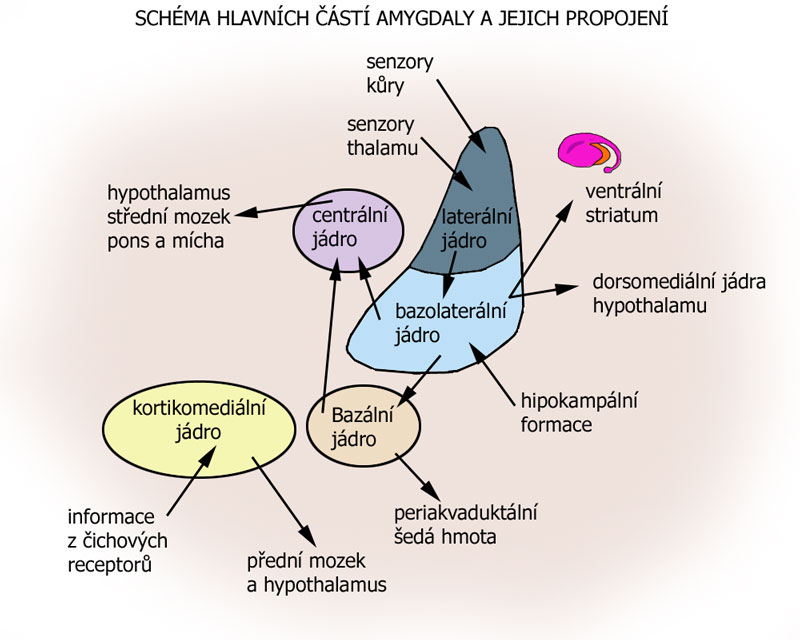 schématické propojení hlavních částí amygdaly